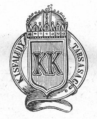 A Kisfaludy Társaság (1836–1952) emblémája egy 1881-es kiadványon